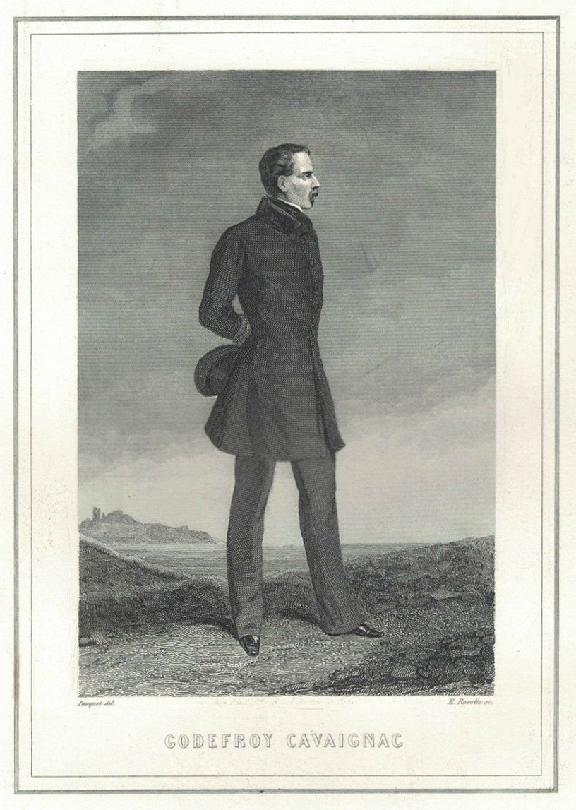 Godefroi Cavaignac (1800-1845). Gravure du XIXe siècle (vers 1850-1860) sur papier fort. Dimension de la feuille 31,5 x 22 cm. Gravure d'Hippolyte Pauquet, d'après un dessin de E. Rosotte.